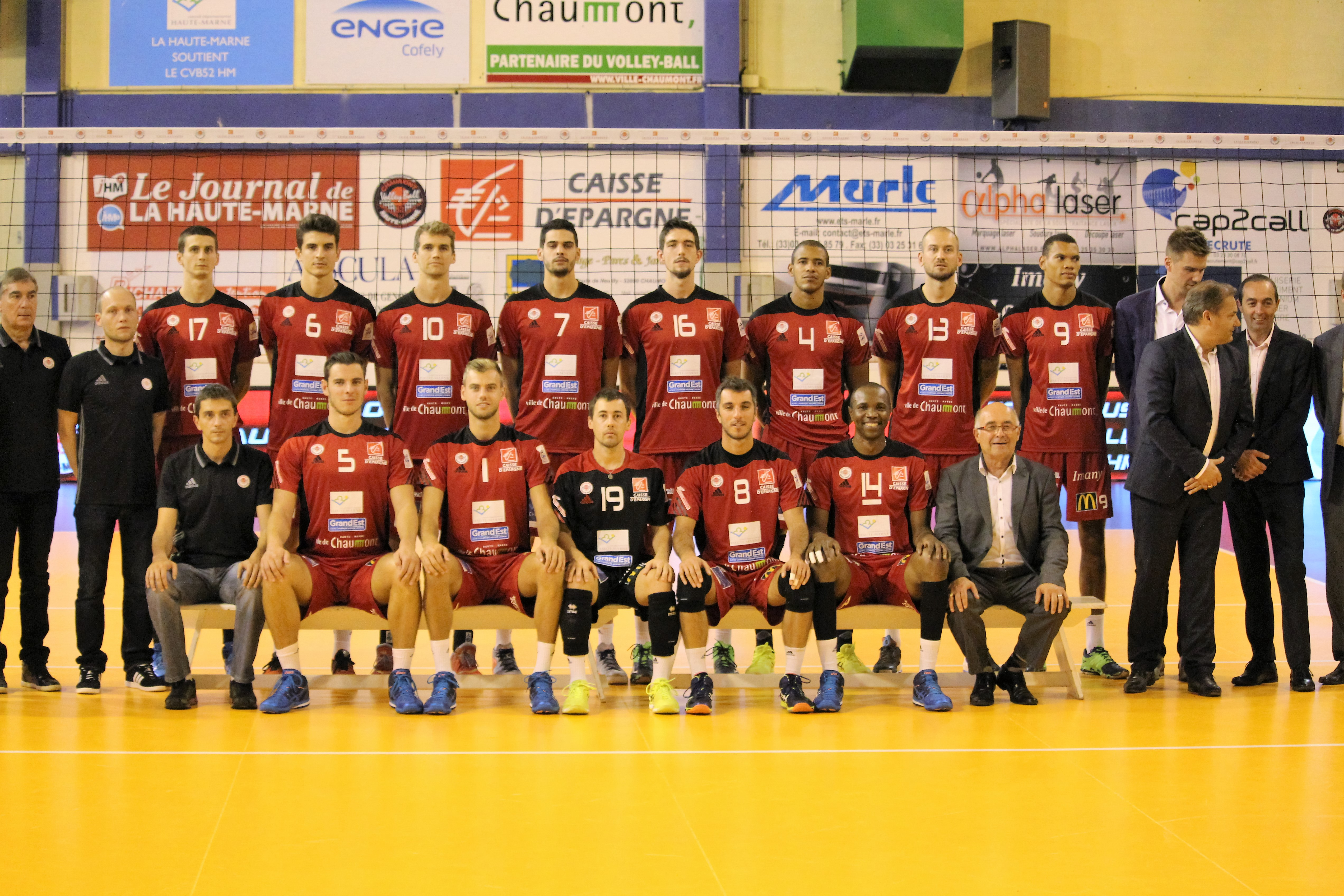 Photo de groupe prise lors du Tournoi International AESCULAP 2016